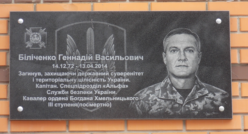 Меморіальна дошка Г.В. Біличенку. Полтава.